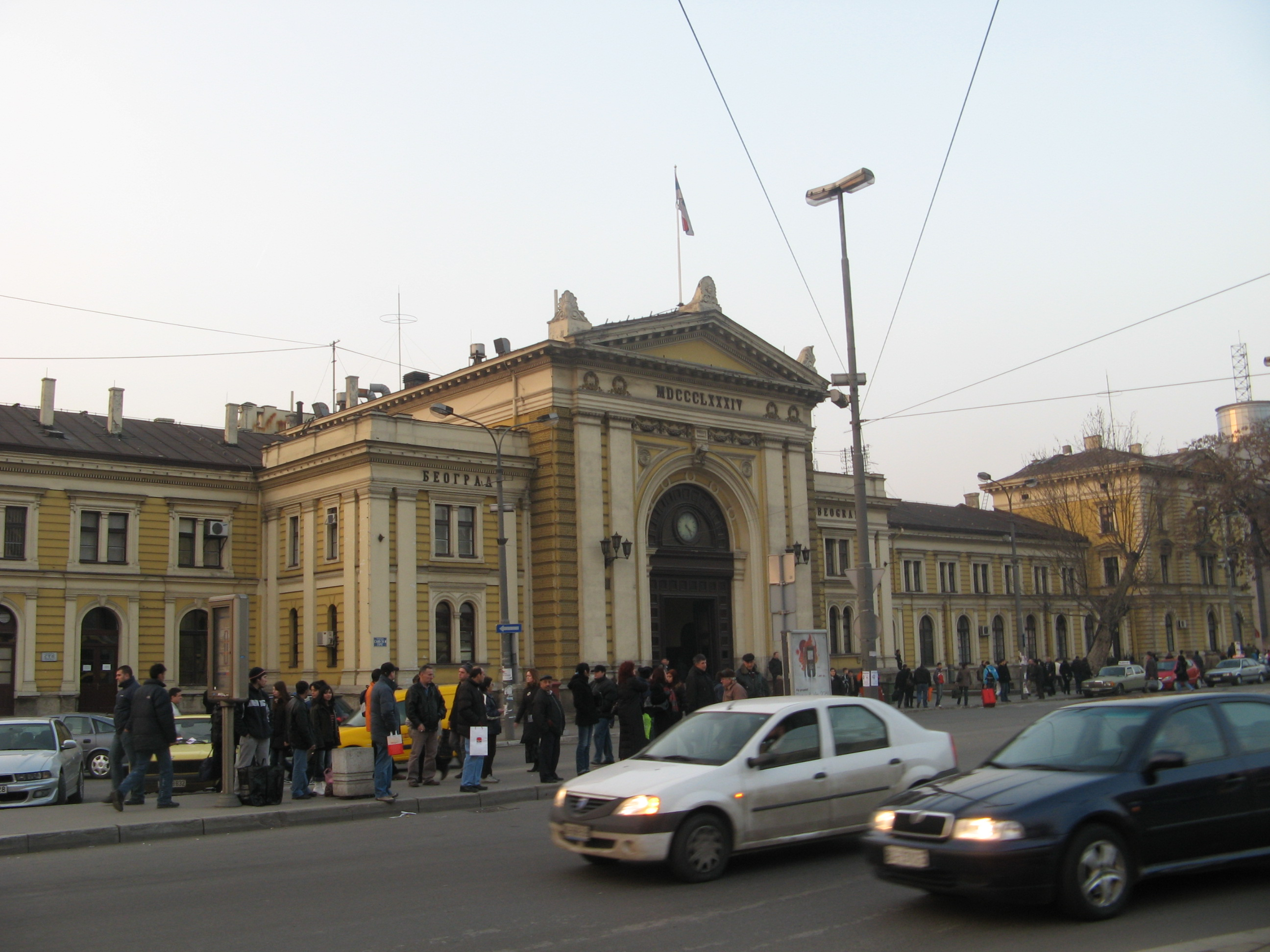 Железничка станица Београд–Главна